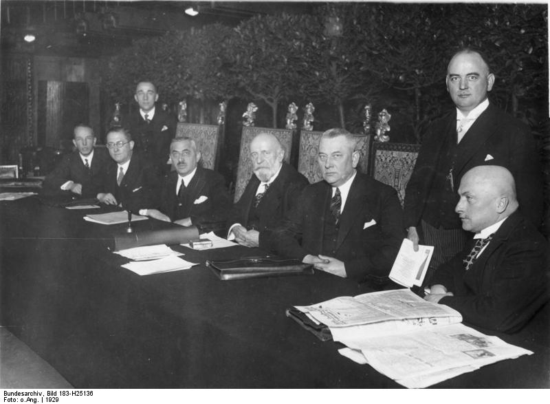 25 Jahrfeier des Giroverbandes der Genossenschaftsabteilung der Dresdner Bank, Der Tisch des Vorstandes v.n.r. Dir. Meyer (Dresdner Bank), Dir. Raimund von der Genossenschaftsabt. Dir. Dr.h.c. Kleemann (Dresdner Bank), Dir. Malz, Dir. Raetzer, Prof. Stein, hinter Dir. Meyer stehend Prokurist Neve, hinter Prof. Stein stehend Dir. Bredenbreuker. 3861-29